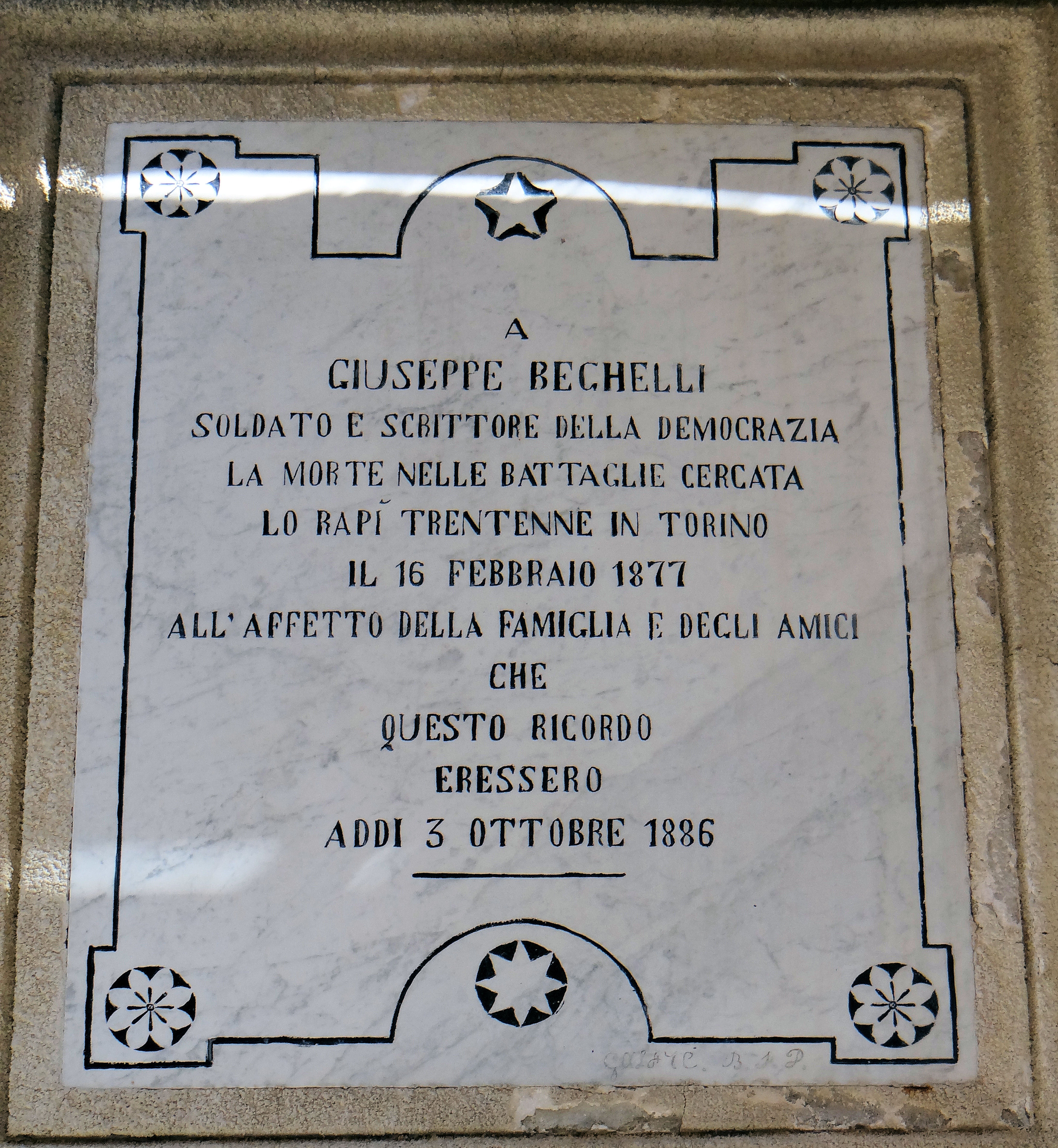 La Brigue - Plaque commémorative à Giuseppe Bechelli